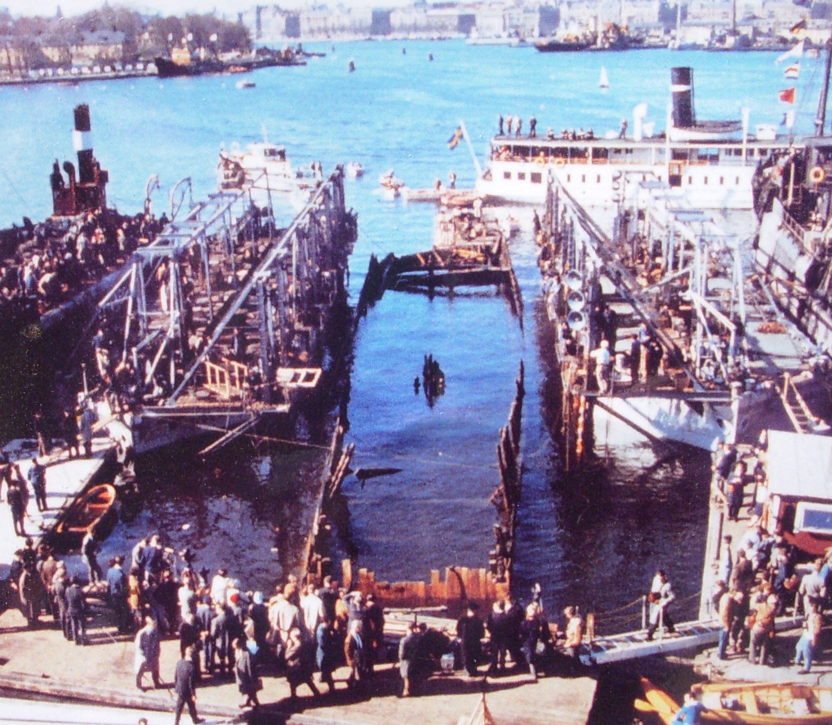 Vasa lyfts vid Kastellholmen den 24 april 1961.